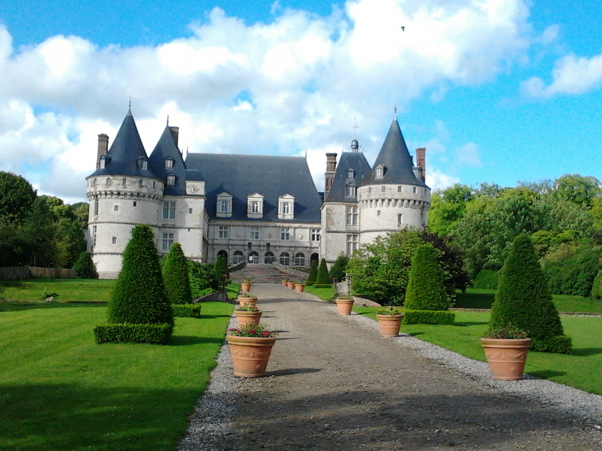 Château de Mesnières